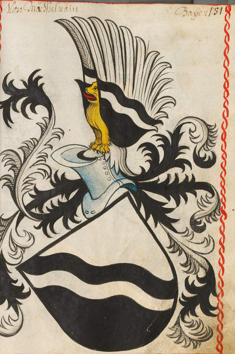 Scheibler'sches Wappenbuch , älterer Teil; Seite 151 Von Mächßelrain Bayern